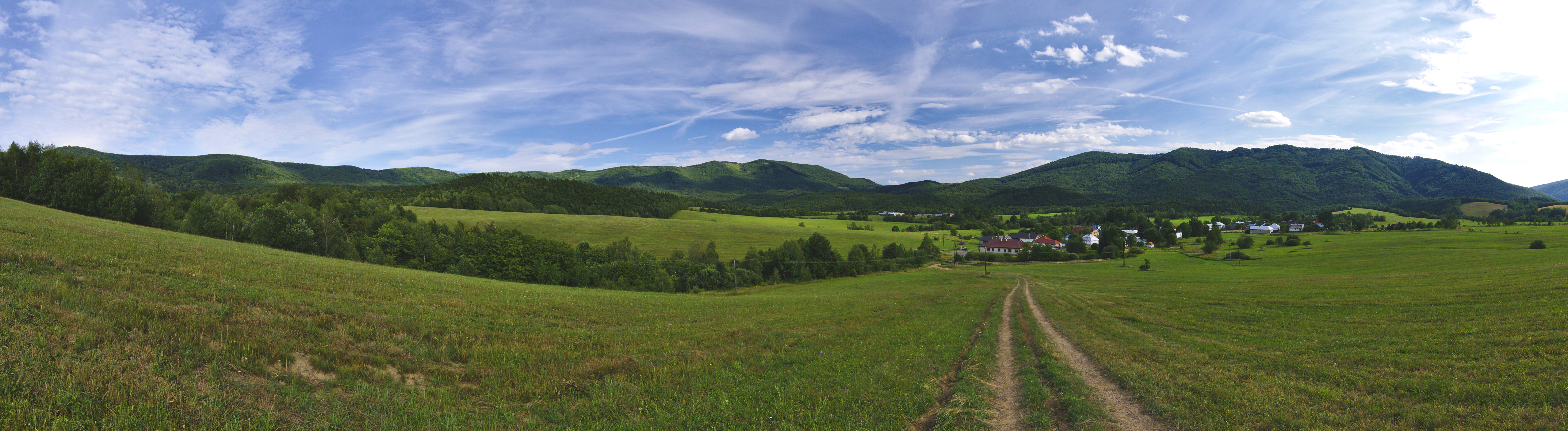 Panoramatický pohled na obec zo severu, Runina, okres Snina